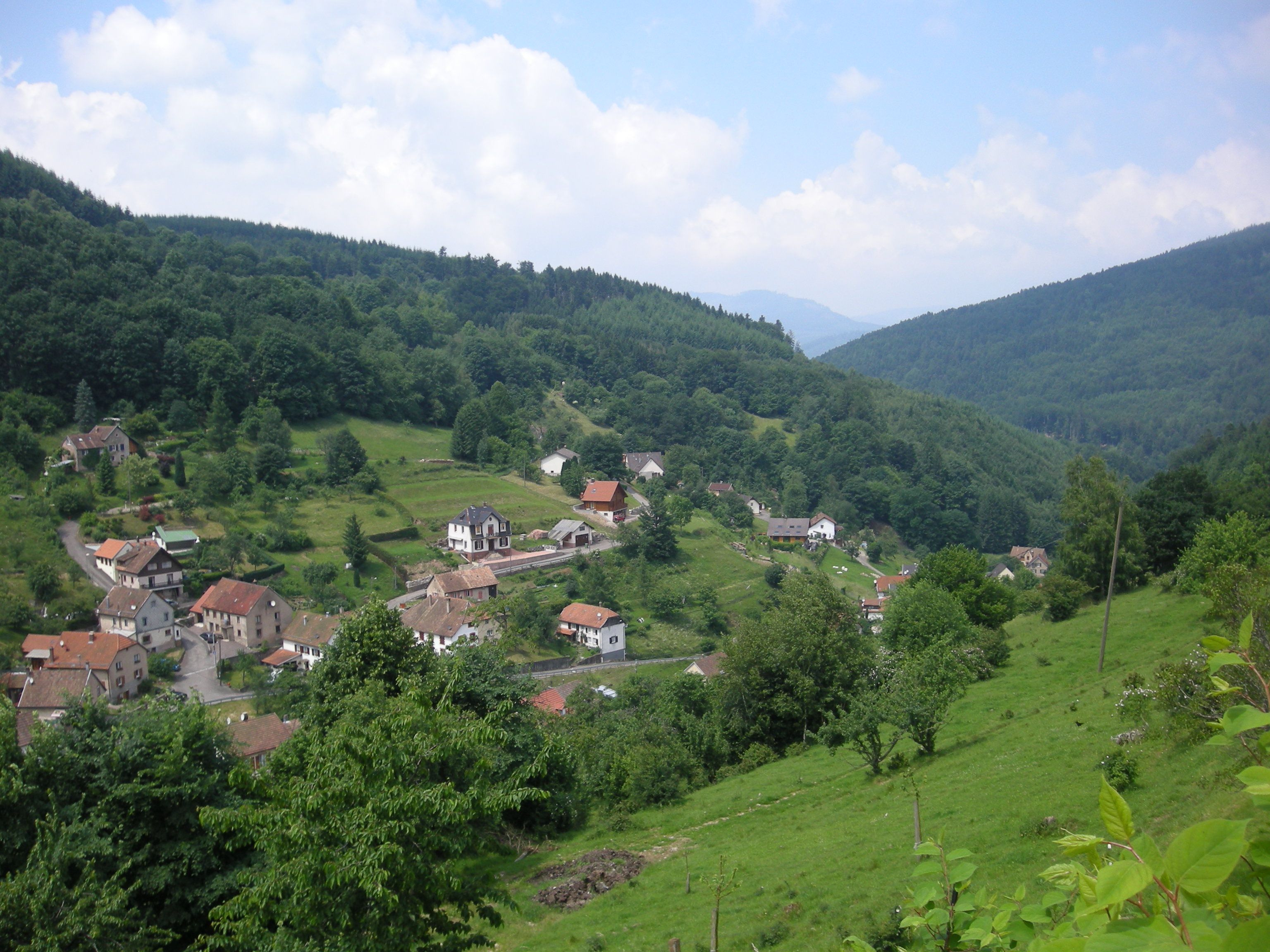 Wildersbach (Bas-Rhin)